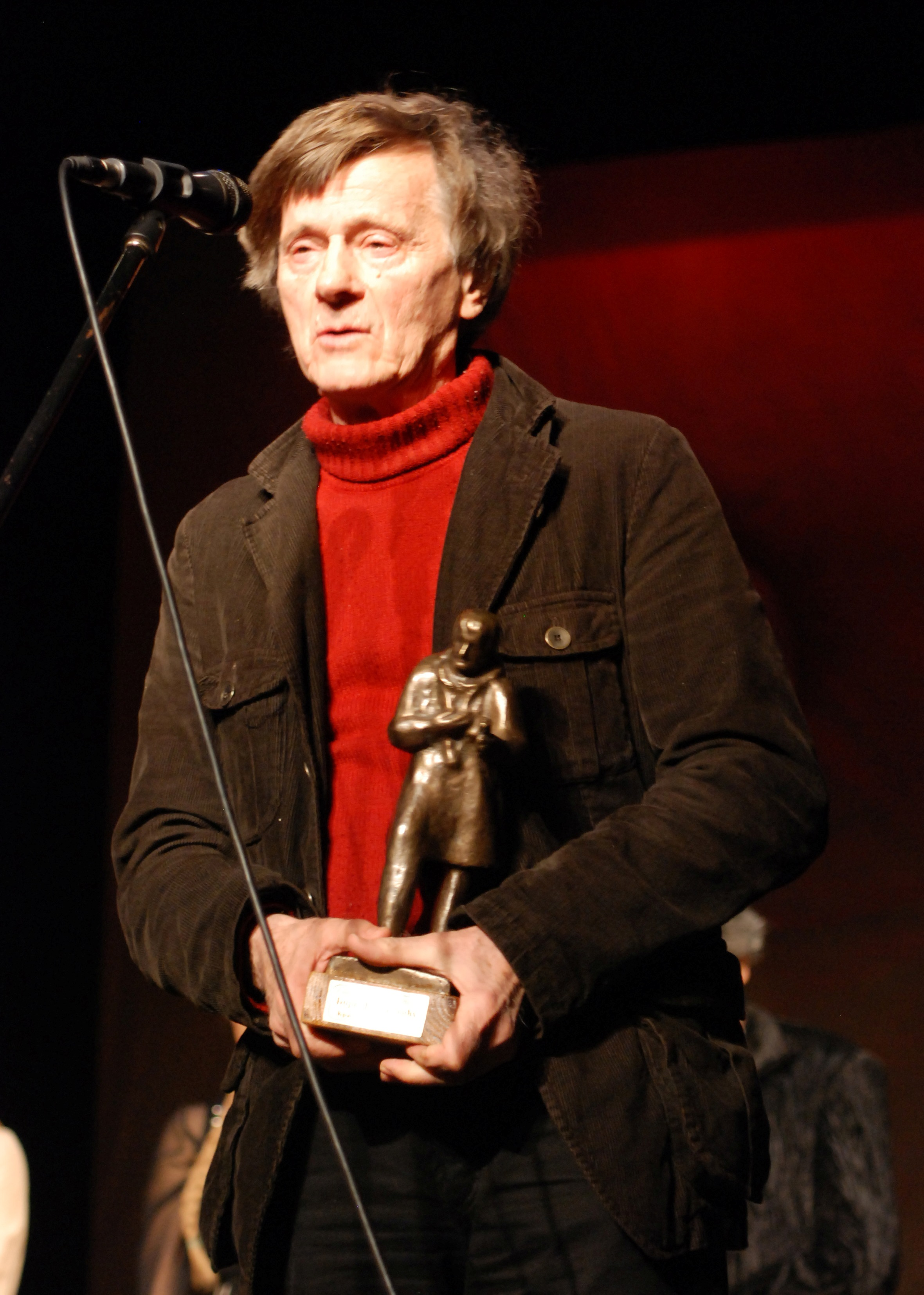 Боро Драшковић, добитник Статуете Јоаким Вујић 2011. године.